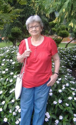 Daura Olema 2012